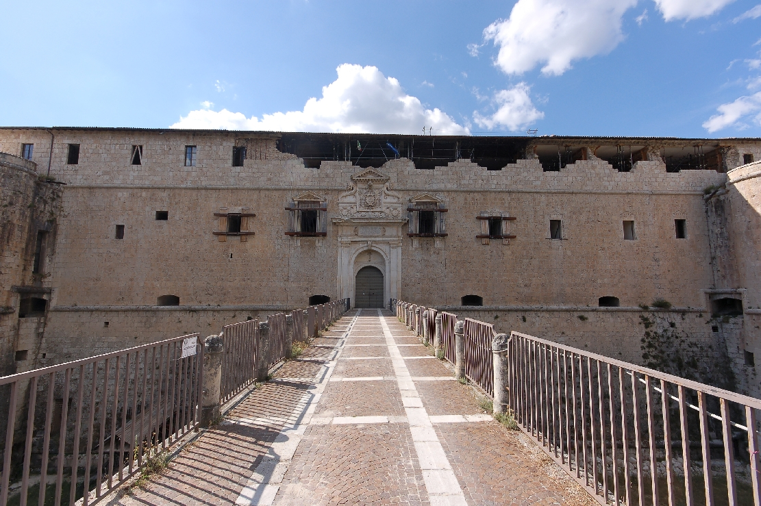 L'Aquila 2011